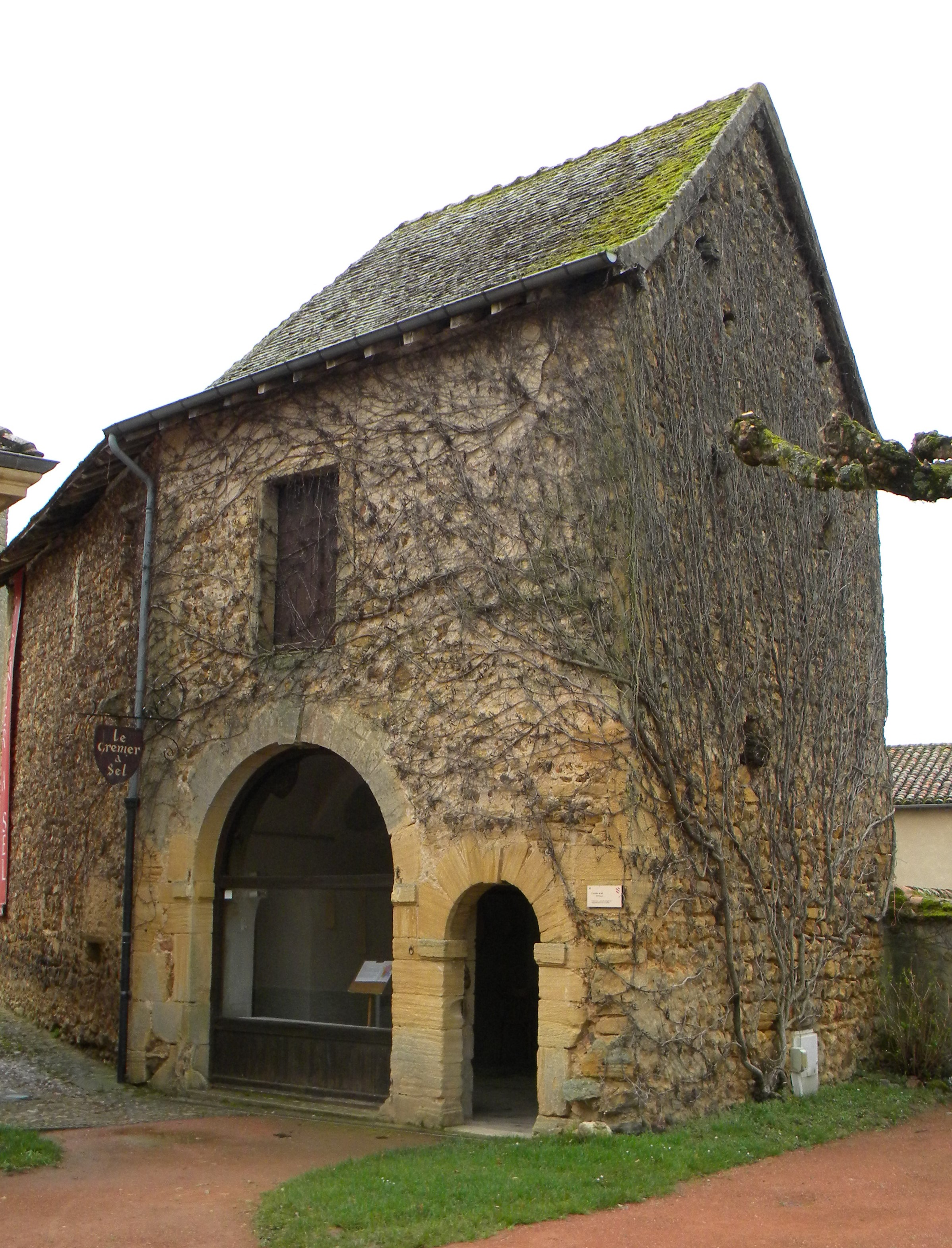 Le grenier à sel de Semur-en-Brionnais, lieu où était perçu les impôts sur le sel.